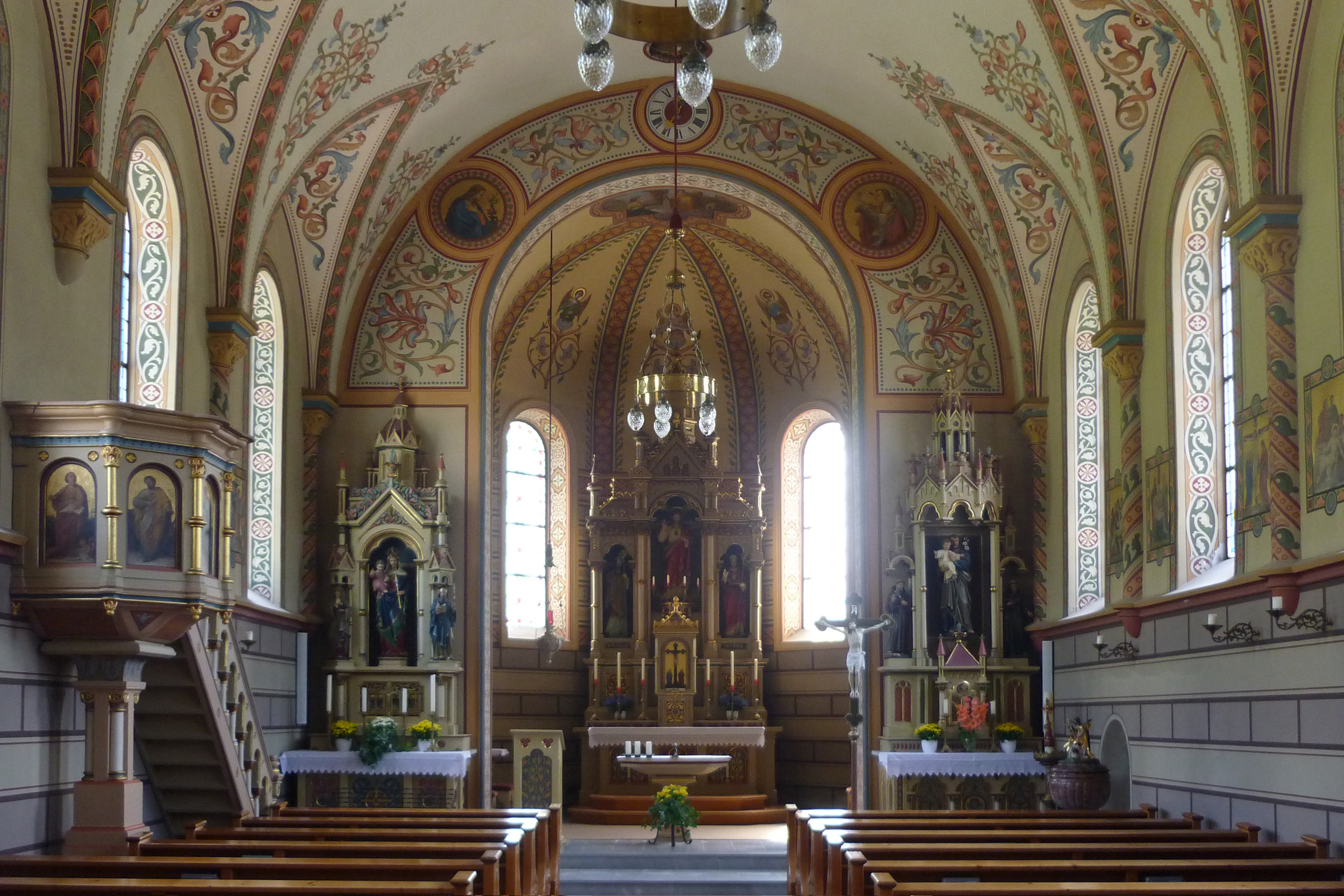 Kath. Pfarrkirche hl. Wolfgang in Schattwald (Tirol)